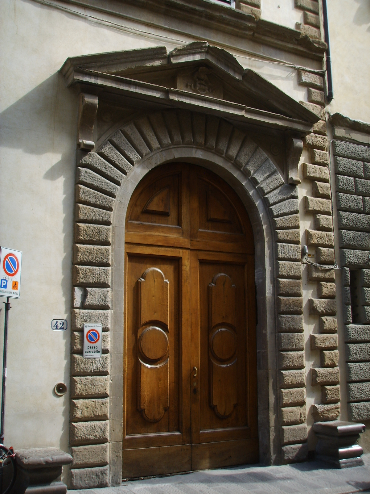 Palazzo gerini 03 portale